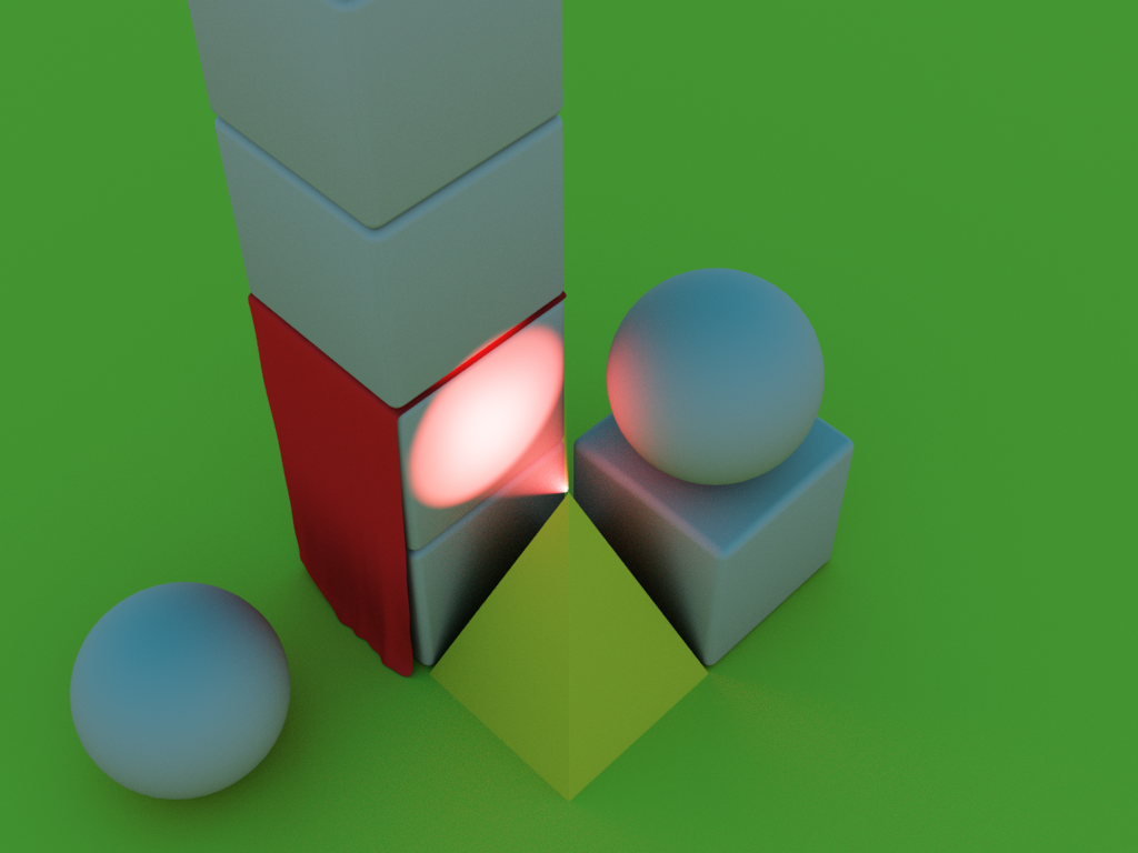 Globale verlichting.